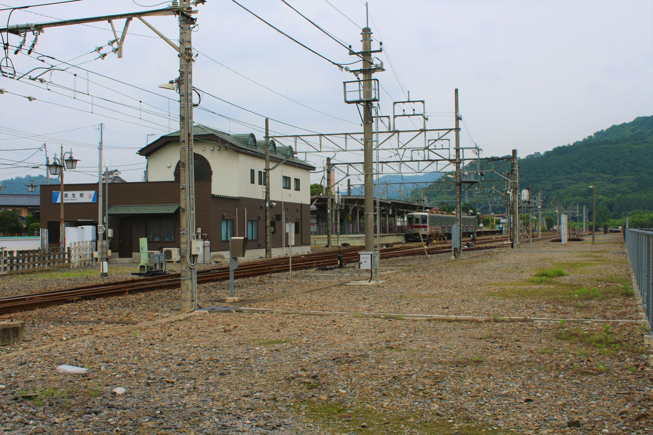 葛生駅構内 Canon EOS Kiss X7i